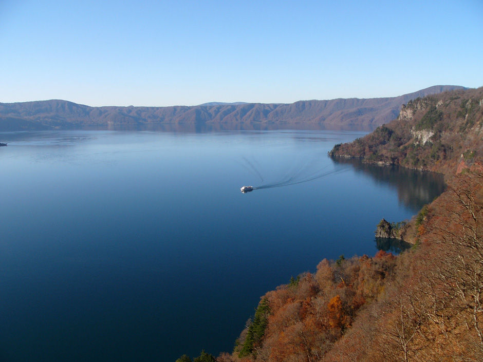 秋の十和田湖